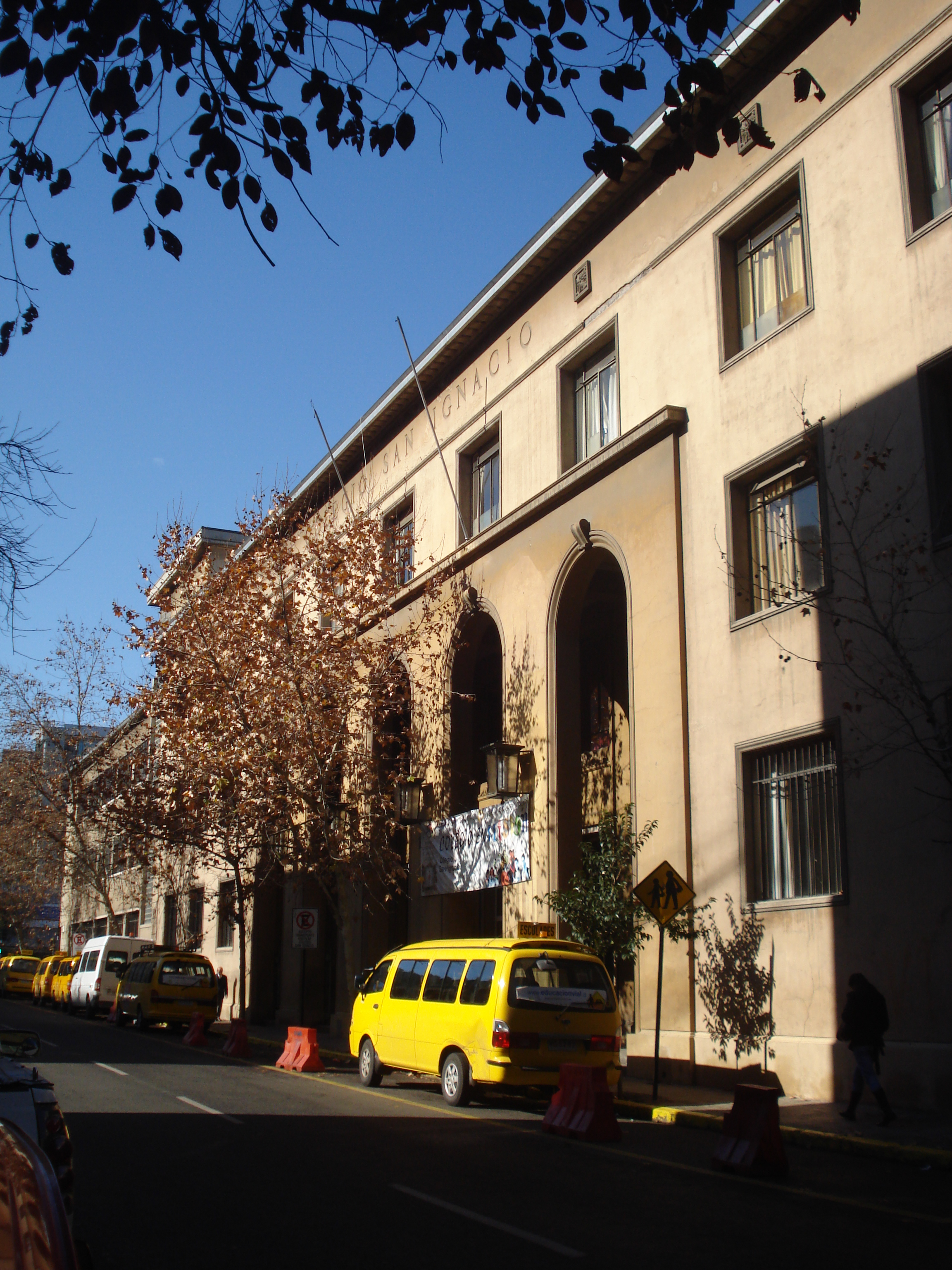 El Centro Educativo Salesianos Alameda (Reconocido por la Ley N° 12446 del 19 de noviembre de 1957) es una de las instituciones educativas mas antiguas y tradicionales de Chile. La orden de los Salesianos toman posesión y fundan el llamado "Asilo de la Patria" el 14 de noviembre de 1891. El primer director fue el Padre Domingo Tomatis, al que acompañaban otros 9 salesianos. El colegio fue inaugurado oficialmente el 6 de enero de 1892, con asistencia del Presidente de la República don Jorge Montt, el Obispo salesiano don Juan Cagliero, el Obispo de Ancud don Juan Lucero, y el Diputado Guillermo Cox Méndez. Se empezó con cuatro talleres: Herrería, Zapatería, Mueblería y Sastrería; en 1897 se añadió Imprenta y Encuadernación. Los primeros alumnos fueron 180 alumnos. Se ha destacado durante su larga historia por formar a personajes destacados dentro de la sociedad chilena, como lo son Senadores de la República, Diputados, grande empresarios, reconocidos artistas, entre otros. Uno de sus directores, el Cardenal Salesiano Raul Silva Henríquez, fue un gran defensor de los derechos humanos en los tiempos mal álgidos de la historia del país, como lo fue el gobierno del General Augusto Pinochet Ugarte.